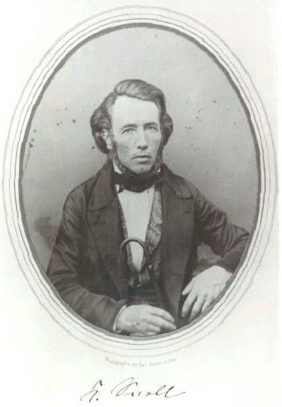 Professor Karl Snell (Quelle: Professorengalerie der Phys.-Astro. Fak. der FSU Jena)